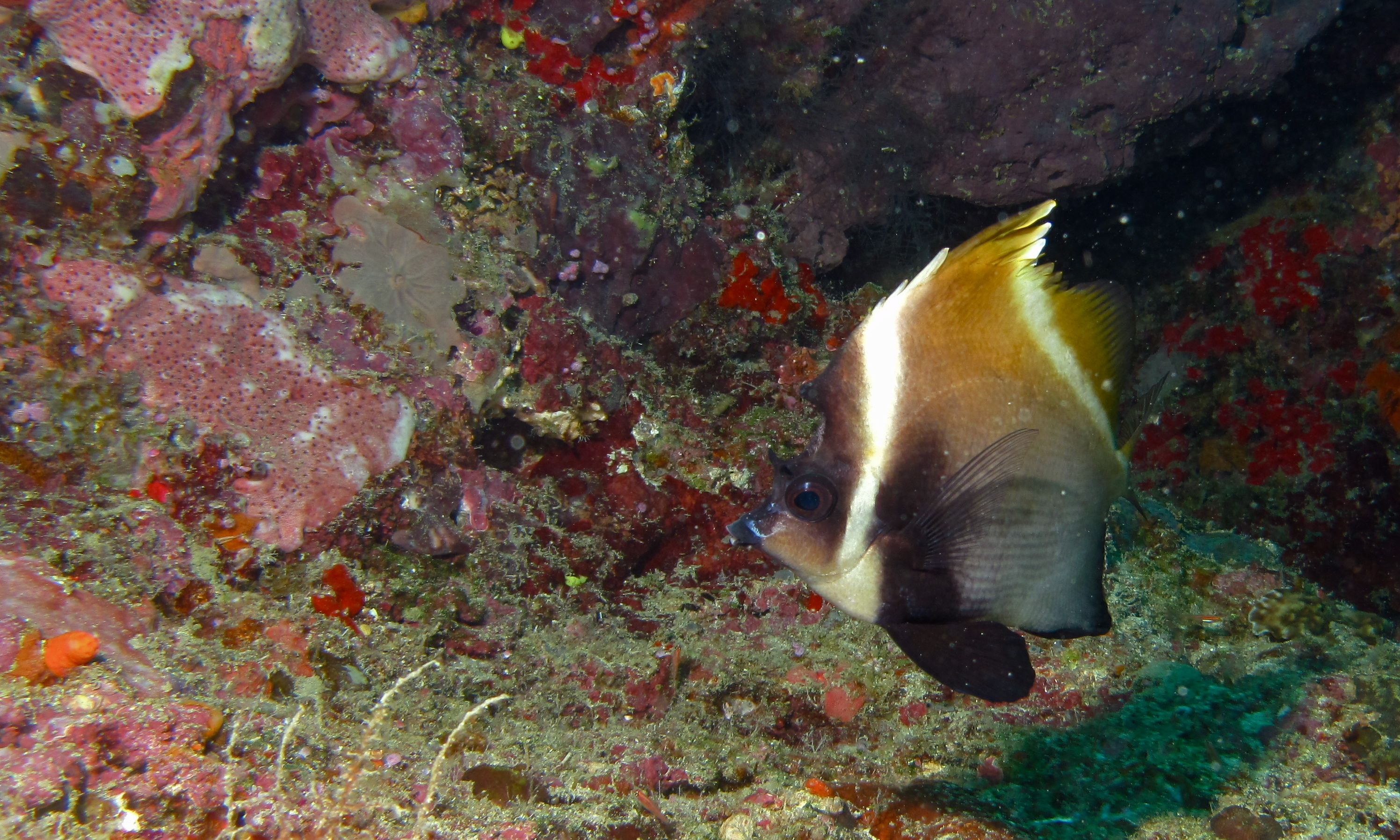 Hanging Gardens, Sipadan, Sabah, MALAYSIA